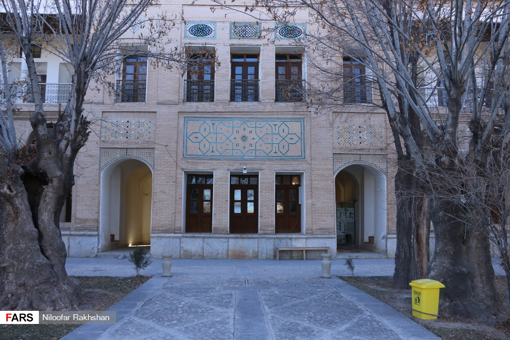 قلعه دزک قلعه دزک، قلعه‌ای است در روستایی به نام دزک که در فاصله ۳۵ کیلومتری شهرکرد، مرکز استان چهارمحال و بختیاری، واقع است. این قلعه که ماه‌ها و سال‌ها به دست هنرمندانی از دیار اصفهان معماری و تزیین شده‌است، افراد مهمی را که در امورات مملکتی نفوذ و قدرت زیادی داشتند در خود جای داده است.